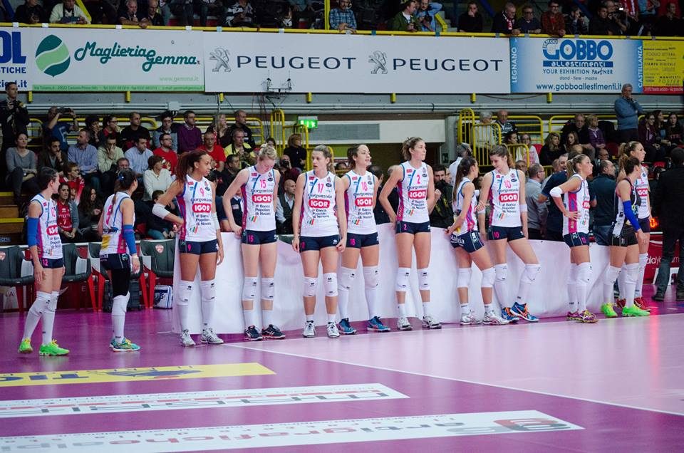 Stagione 2014-15